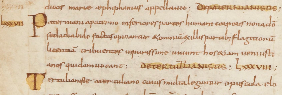 Августин в книге «De Haeresibus ad Quodvultdeum Liber Unus» («Ереси, попущением Бога, в одной книге») о патернианах. «Smaragdus». рукопись IX века.